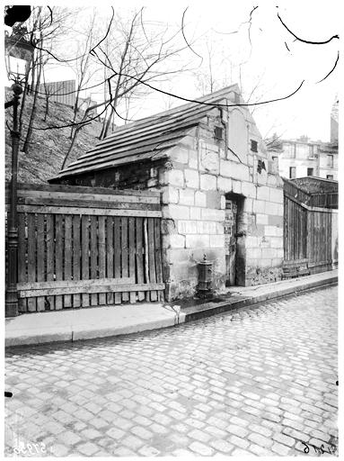 Façade sur rue